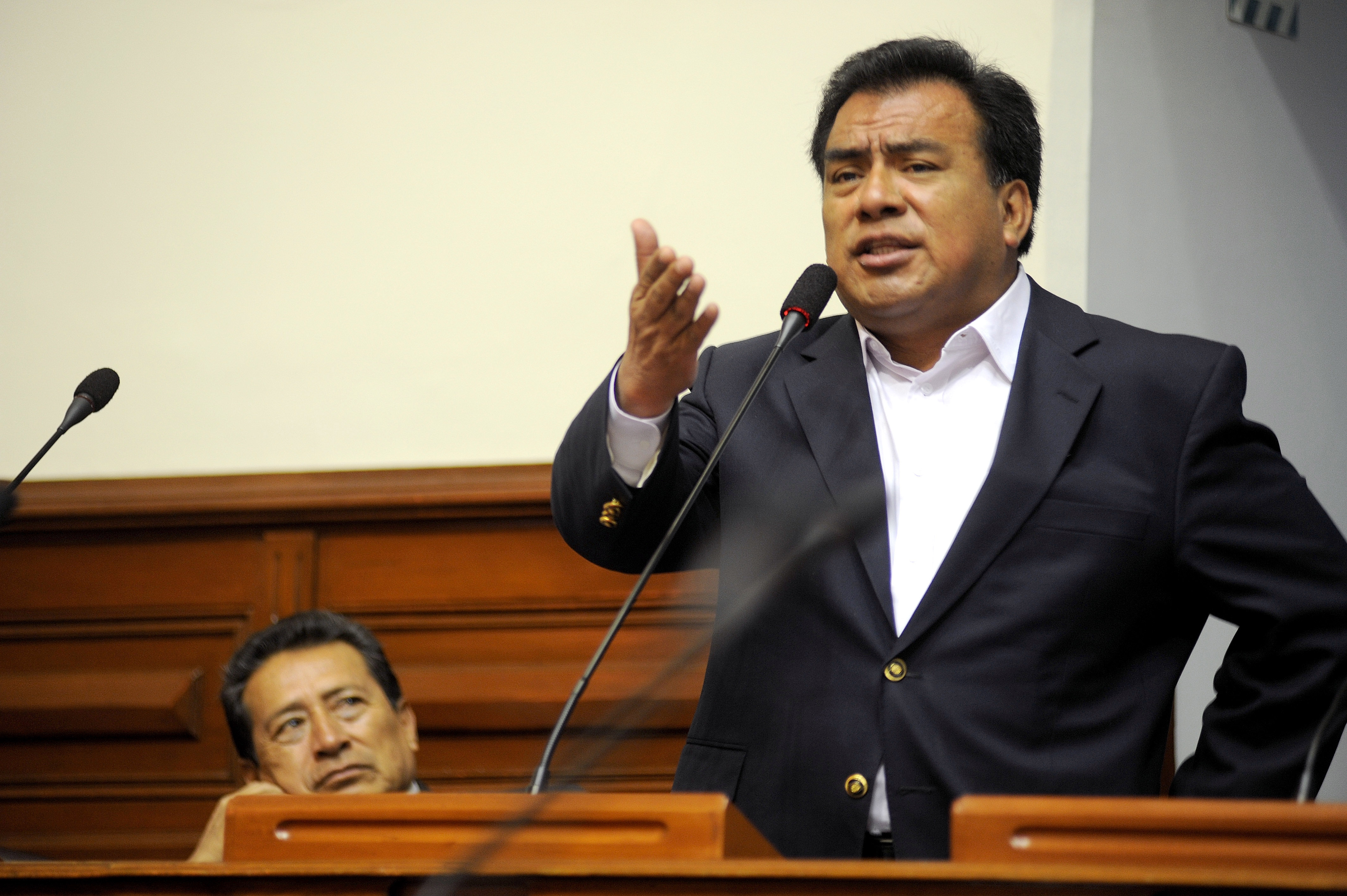 El legislador Javier Velásquez expresa su posición en el debate parlamentario realizado esta mañana por el Pleno congresal.